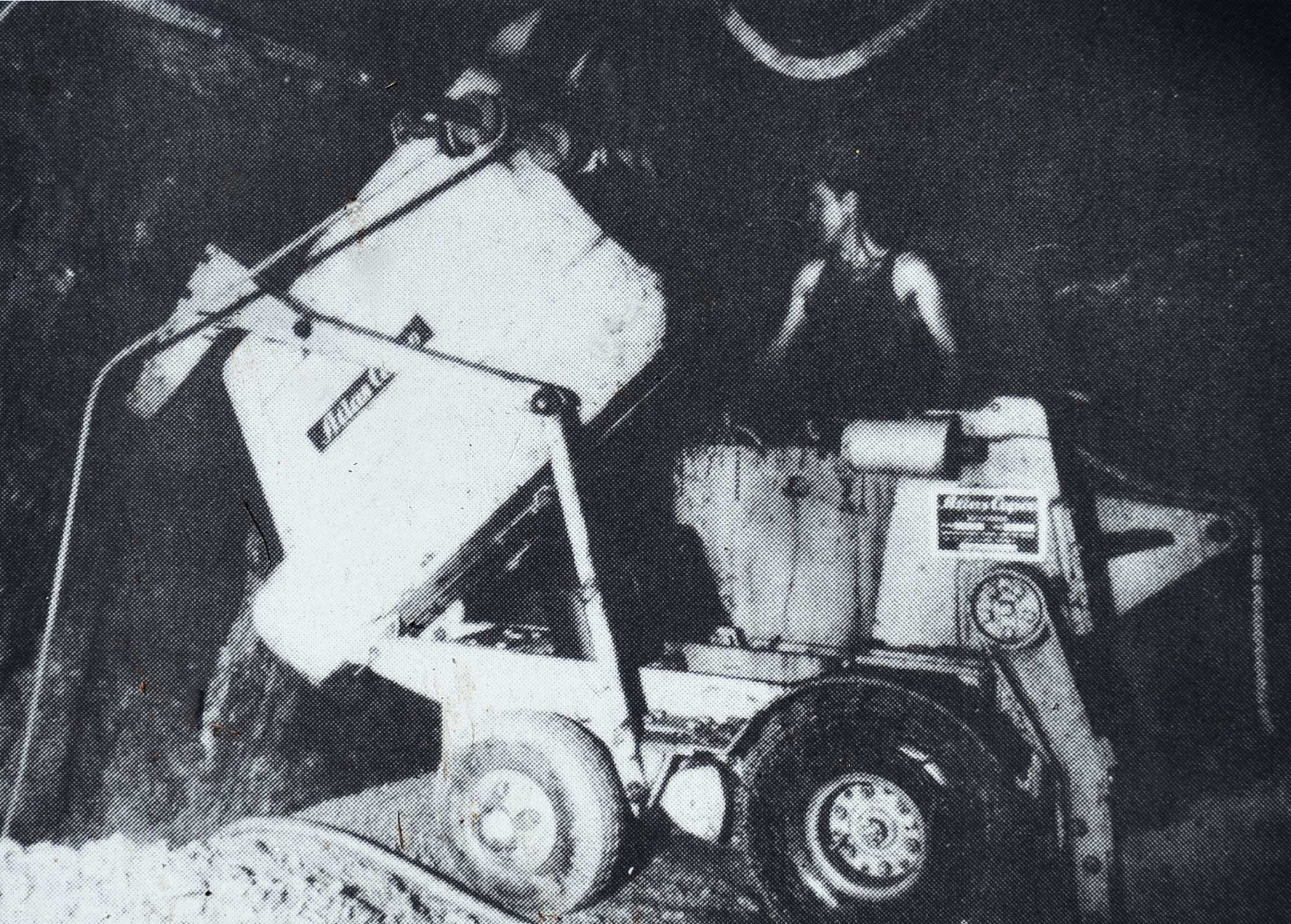 Grube Füsseberg - Friedrich Wilhelmː Bunkerlader der Firma Atlas Copco zur Hereingewinnung des Haufwerks. Die Abbildung zeigt den Hauer bei der Entleerung des Bunkergefäßes in eine Sturzrolle. Das Bild entstand in Füsseberg zwischen Ende der 1950er Jahre und 1965.